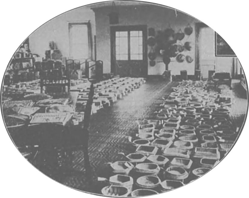 盛進合資会社（水口細工）滋賀県甲賀市 1897年創業、1910年頃